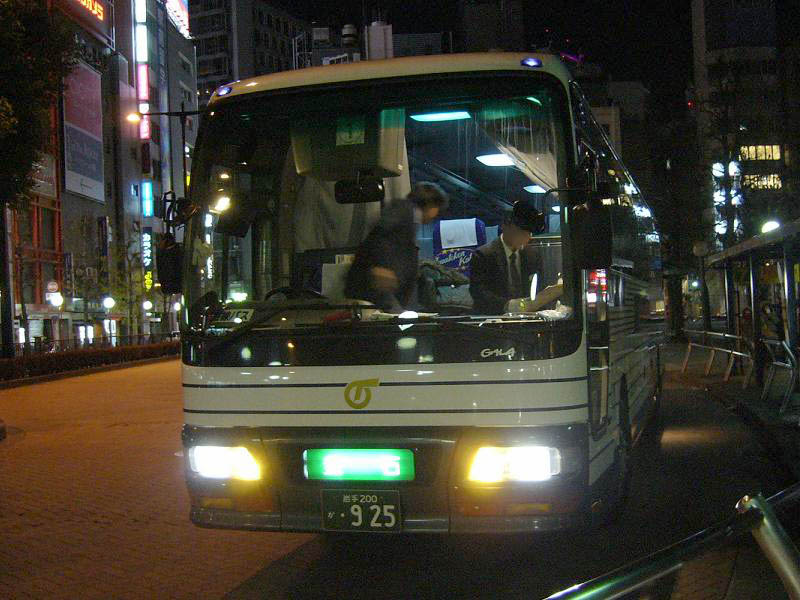 陸運番号 岩手200か・925 岩手県交通所属 けせんライナー用 2006年1月8日 池袋駅西口で撮影 撮影者 Tokatsu kokubu